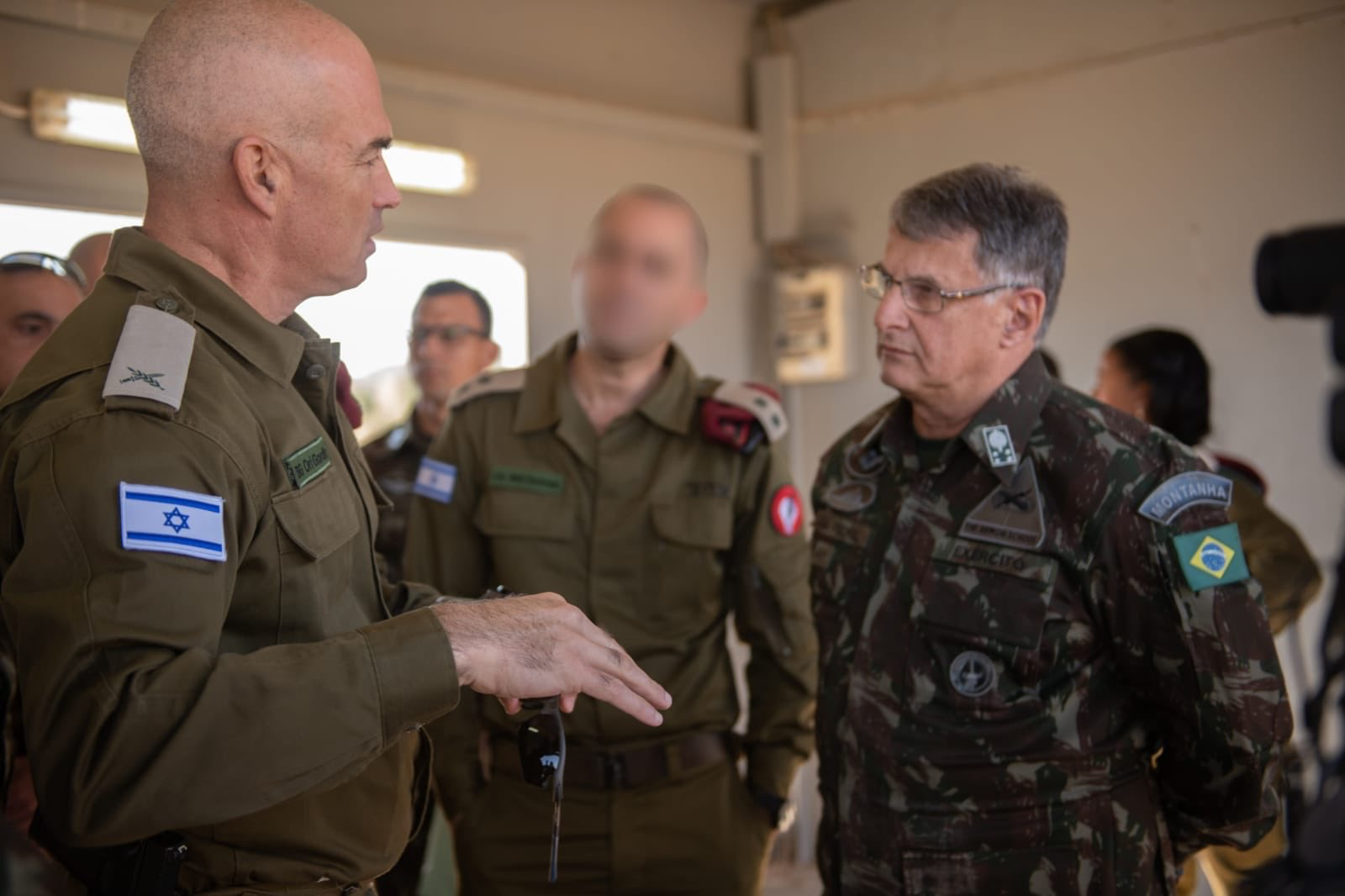 ביקור מפקד צבא היבשה של ברזיל בצה"ל, הגנרל אדסון ליאל פוג'ול. בתמונה עם רמ"ט זרוע היבשה, תא"ל אורי גורדין.